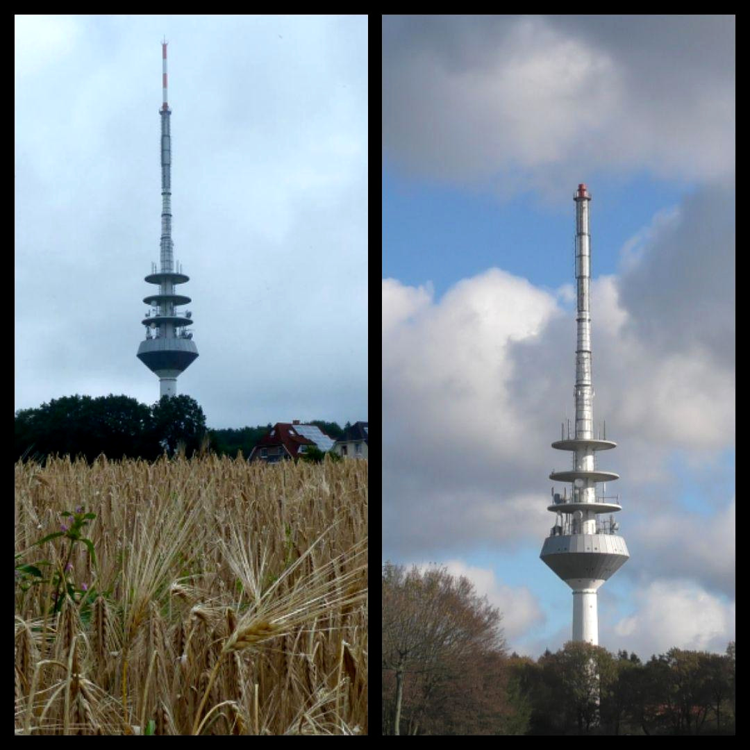 FMT Rosengarten Rückbau Eigentümer: DFMG Foto vorher - nachher (Quelle: Nico Kutzner / Karoradio)